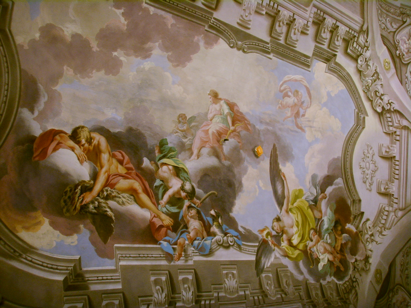 Palazzo sacrati, sala 7 di endimione soffitto 02 Anton Domenico Giarré